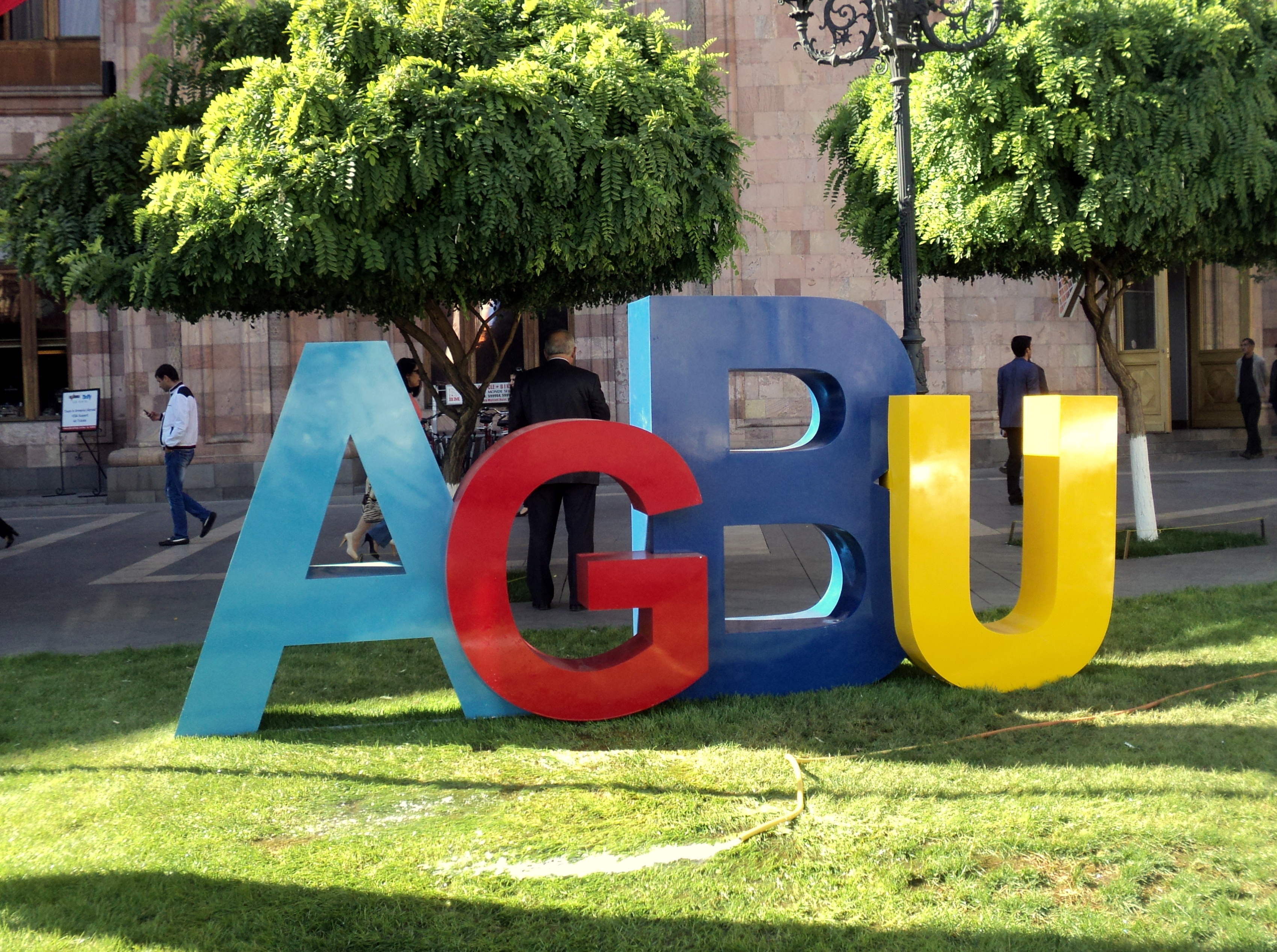 AGBU logo in front of Marriott Hotel Yerevan